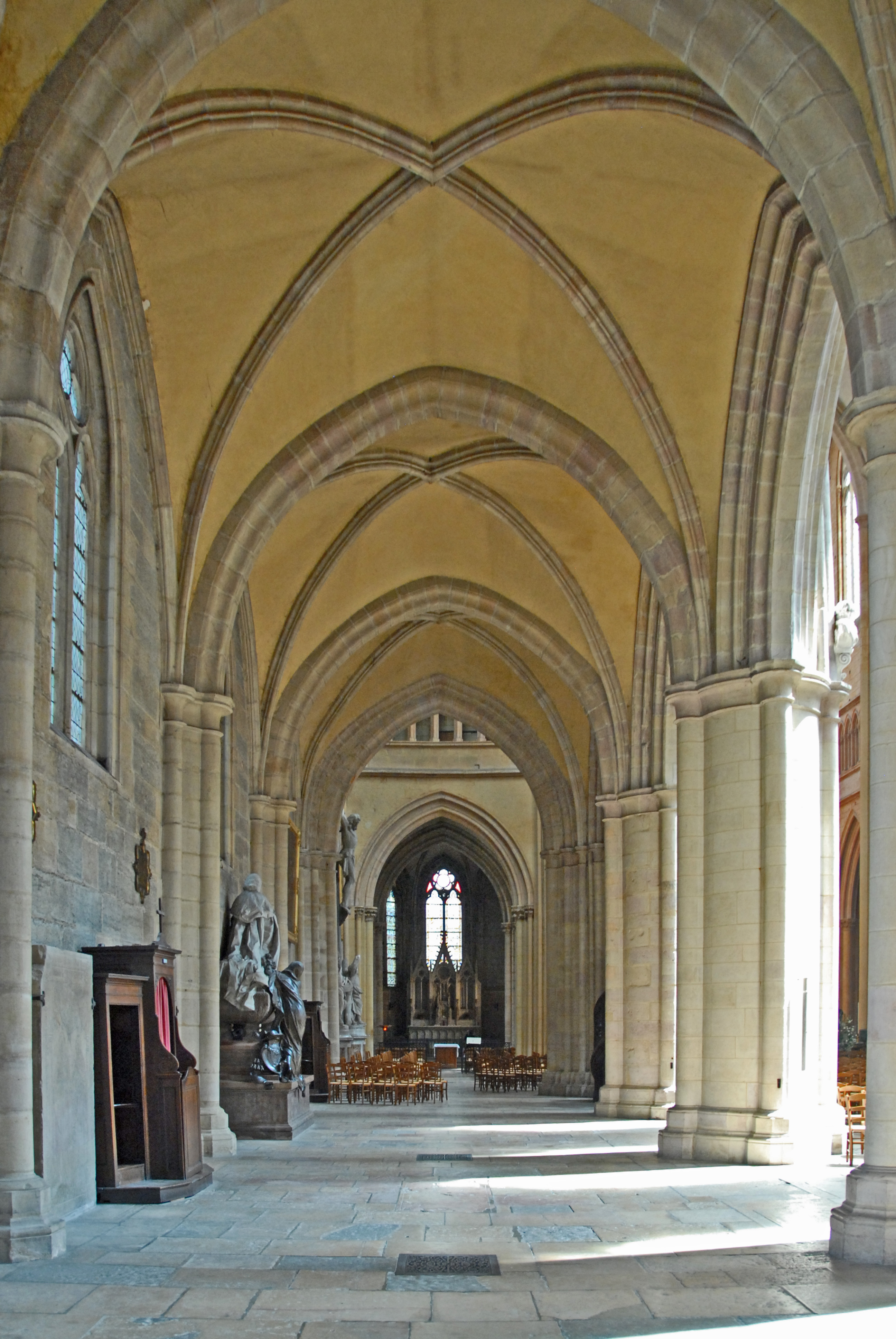 St-Bénigne, nördl. Seitenschiff zum Chor